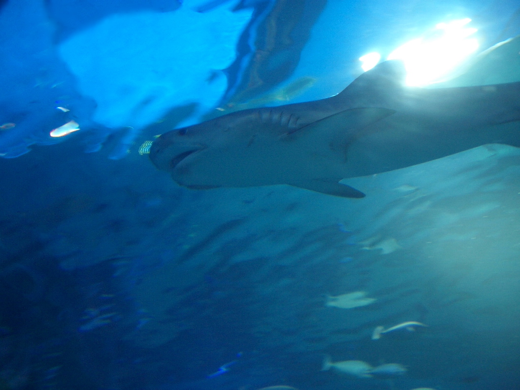 "Public Domain" Ein Tigerhai vor Hawaii.